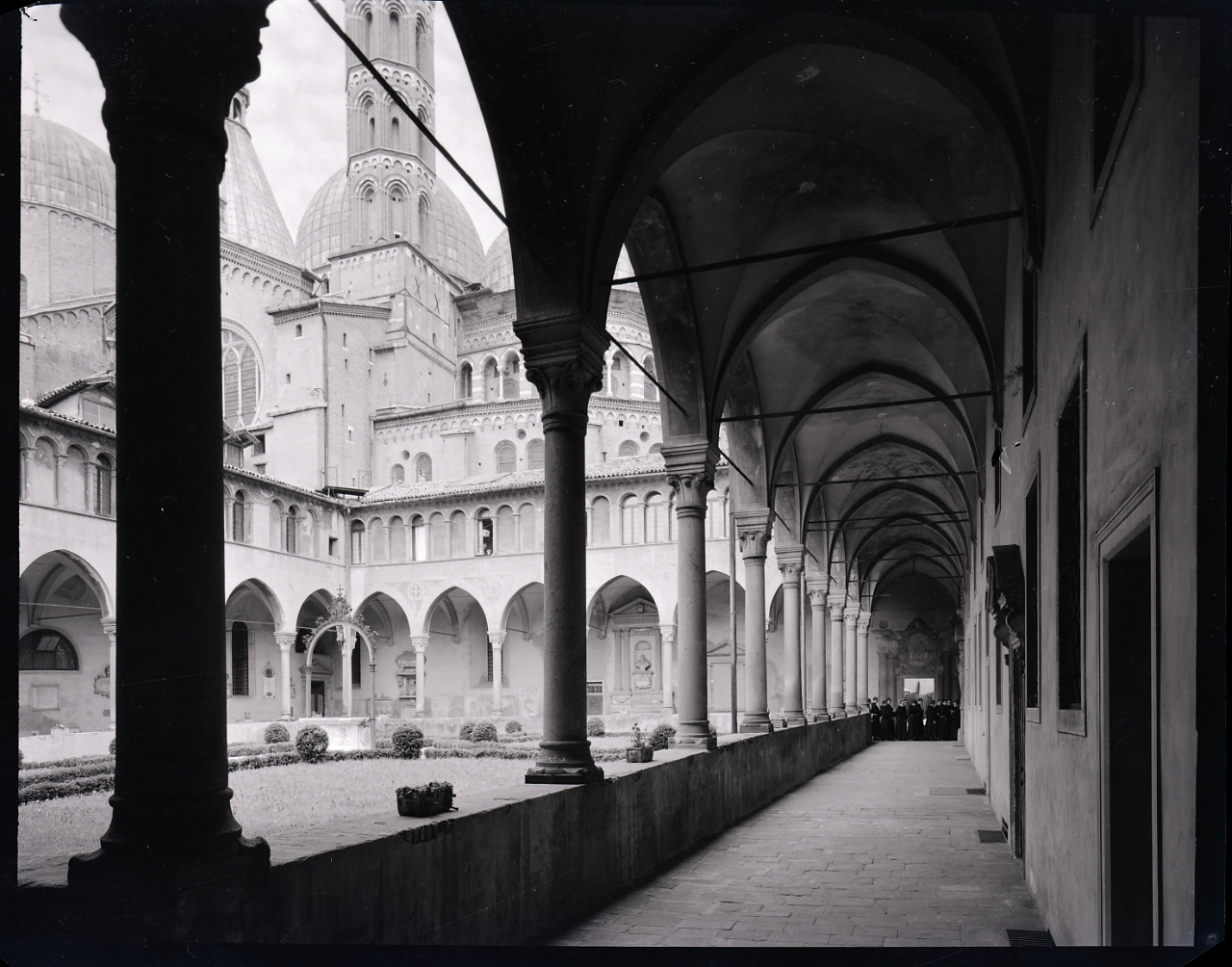 Servizio fotografico : Padova, 1967 / Paolo Monti. - Buste: 42, Fototipi: 44 : Negativo b/n, gelatina bromuro d'argento/ pellicola ; 10x12. - ((Serie costituita da 42 buste sciolte di negativi identificati con i nn.: 13378, 13379, 13380, 13381, 13382, 13383, 13384, 13385, 13386, 13387, 13388, 13389, 13390, 13391, 13392, 13393, 13394, 13394bis, 13395, 13396, 13397, 13398, 13399, 13400, 13401, 13402, 13403, 13404, 13405, 13406, 13407, 13408, 13409, 13410, 13411, 13412, 13413, 13413bis, 13414, 13414bis, 13415, 13415bis. - Occasione: Documentazione per la pubblicazione: Diego Valeri (a cura di), "Padova: i secoli, le ore", Bologna, Edizioni Alfa, 1967. - Fonte: Monografia di Valeri Diego (a cura di): Padova: i secoli, le ore, Bologna, Edizioni Alfa (1967). - Fonte: Agenda di Paolo Monti: Monti/ 3 aprile 1966 - 9 marzo 1971/ 12421-16823 (1966-1971), presso Archivio Paolo Monti